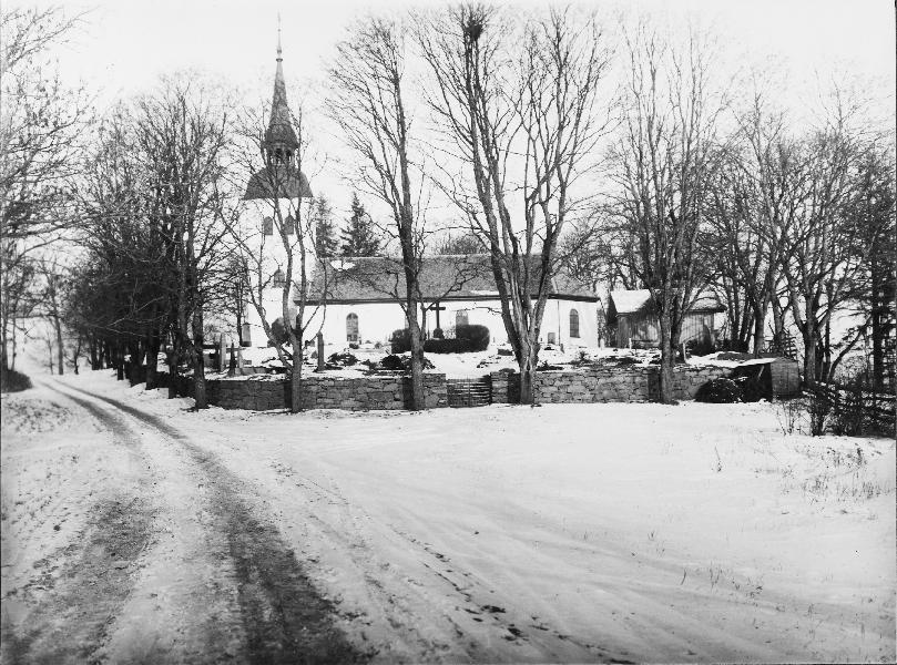 Kyrkan mot söder.